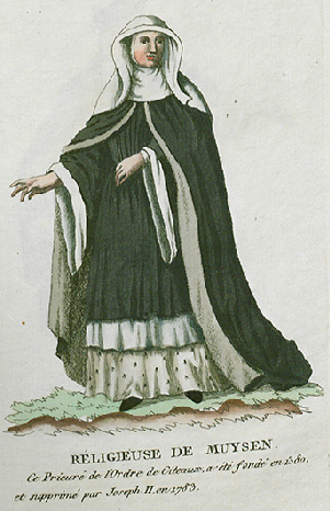 Collection de costumes de tous les ordres monastiques, supprimés à differentes époques, dans la ci-devant Belgique, Bruxelles, Philippe Joseph Maillart et sœur, 1811